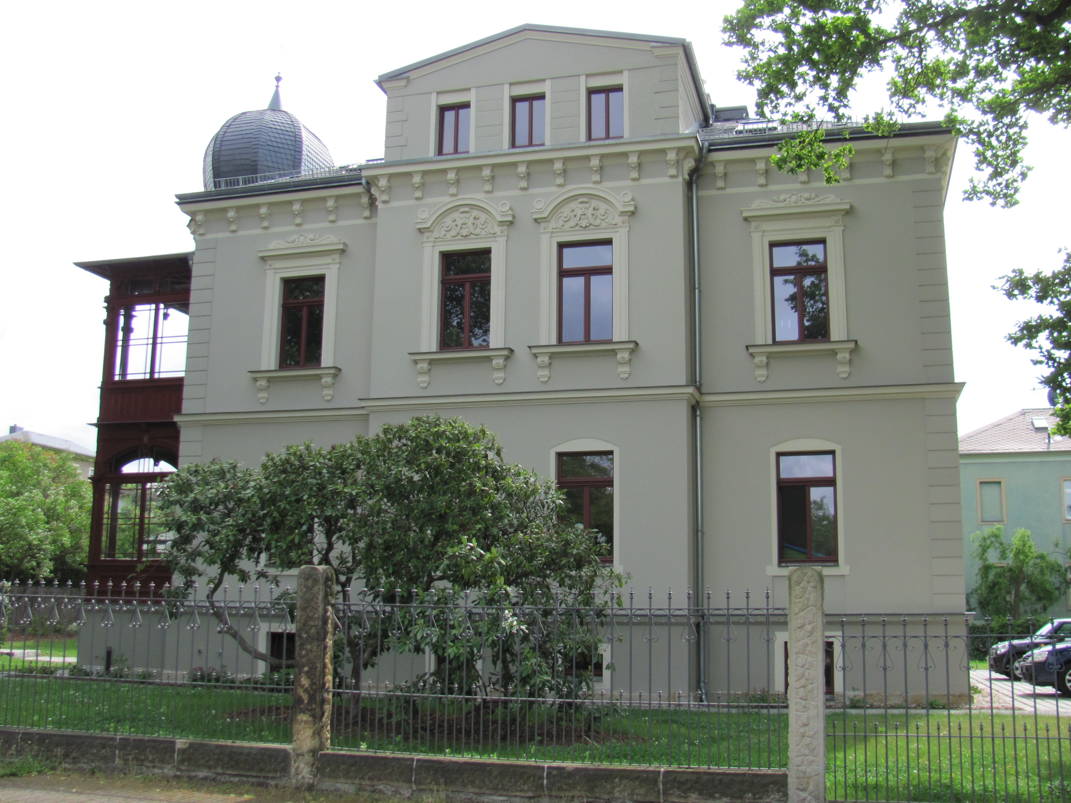 Mietvilla Heinrich Emil Unger